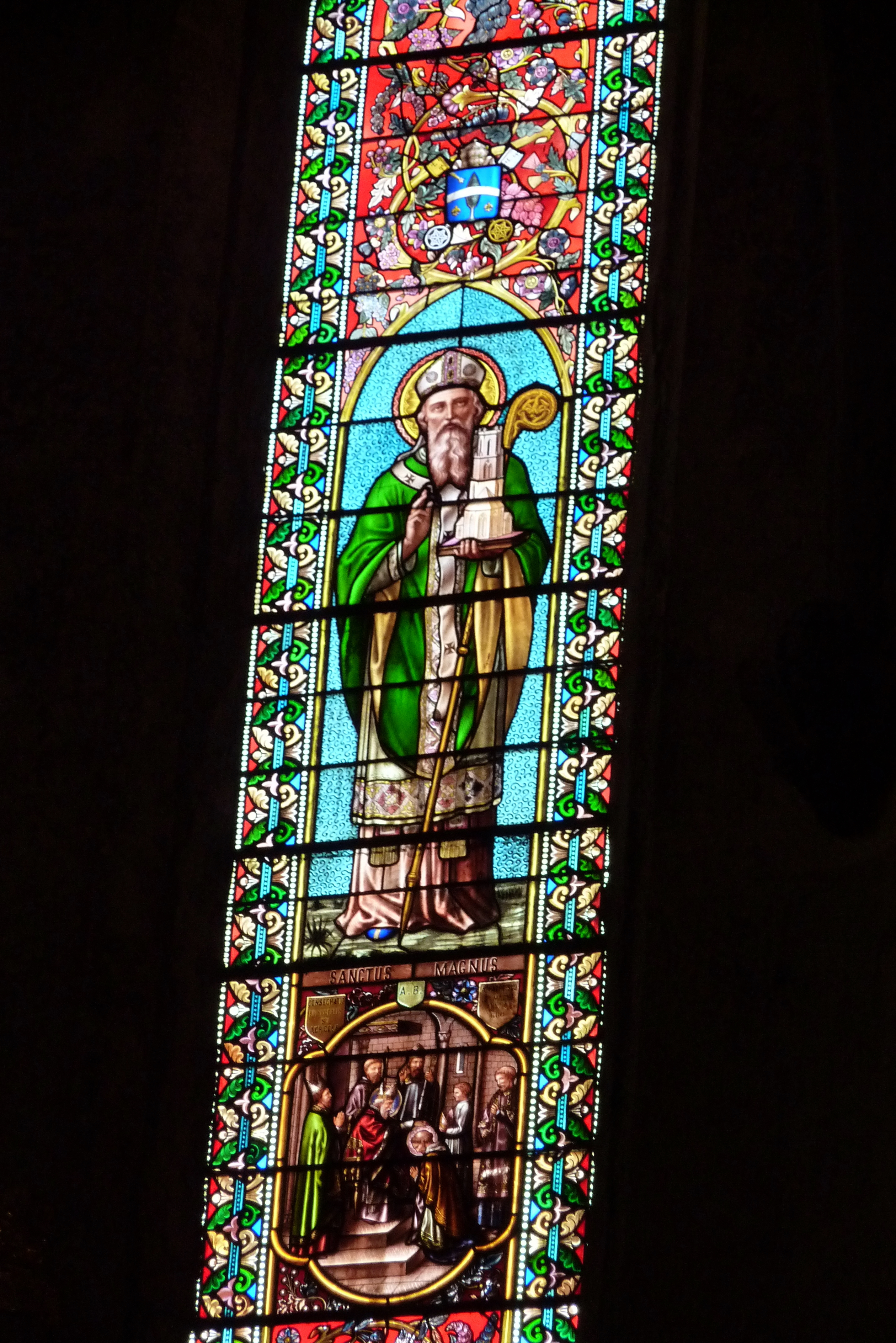 Bleiglasfenster in der Kirche Saint Agricol Avignon, Darstellung: hl. Magnus of Avignon